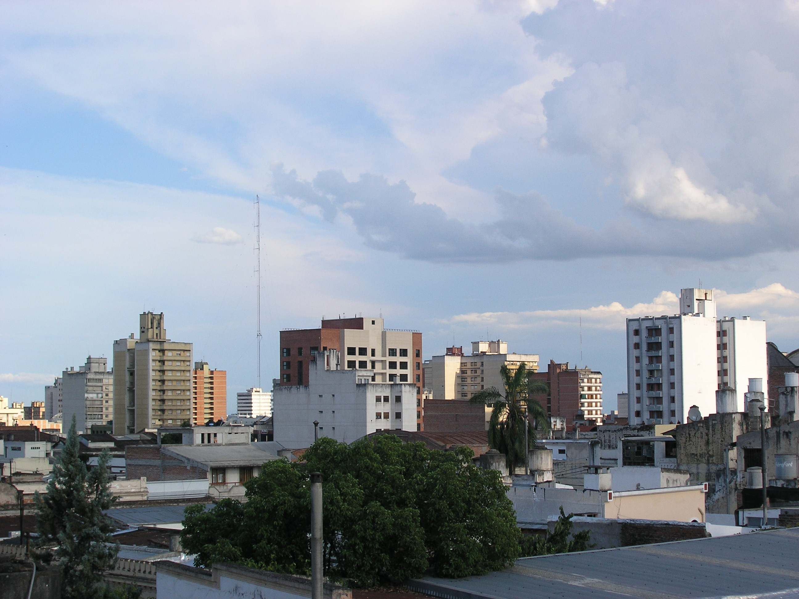 Vista de la zona céntrica de Jujuy.